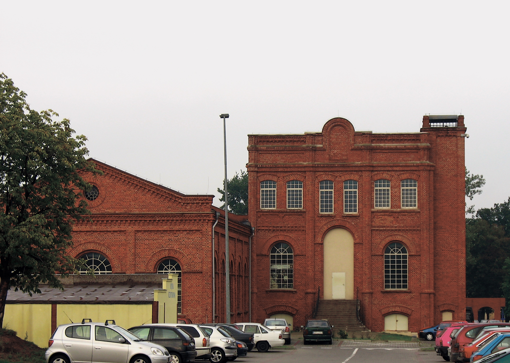 Pozostałości po fabryce Kindelra